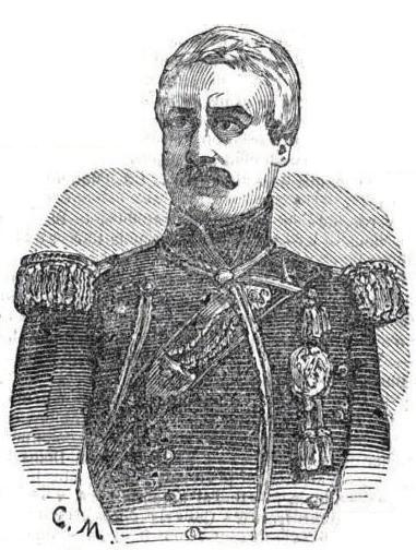 Guinard